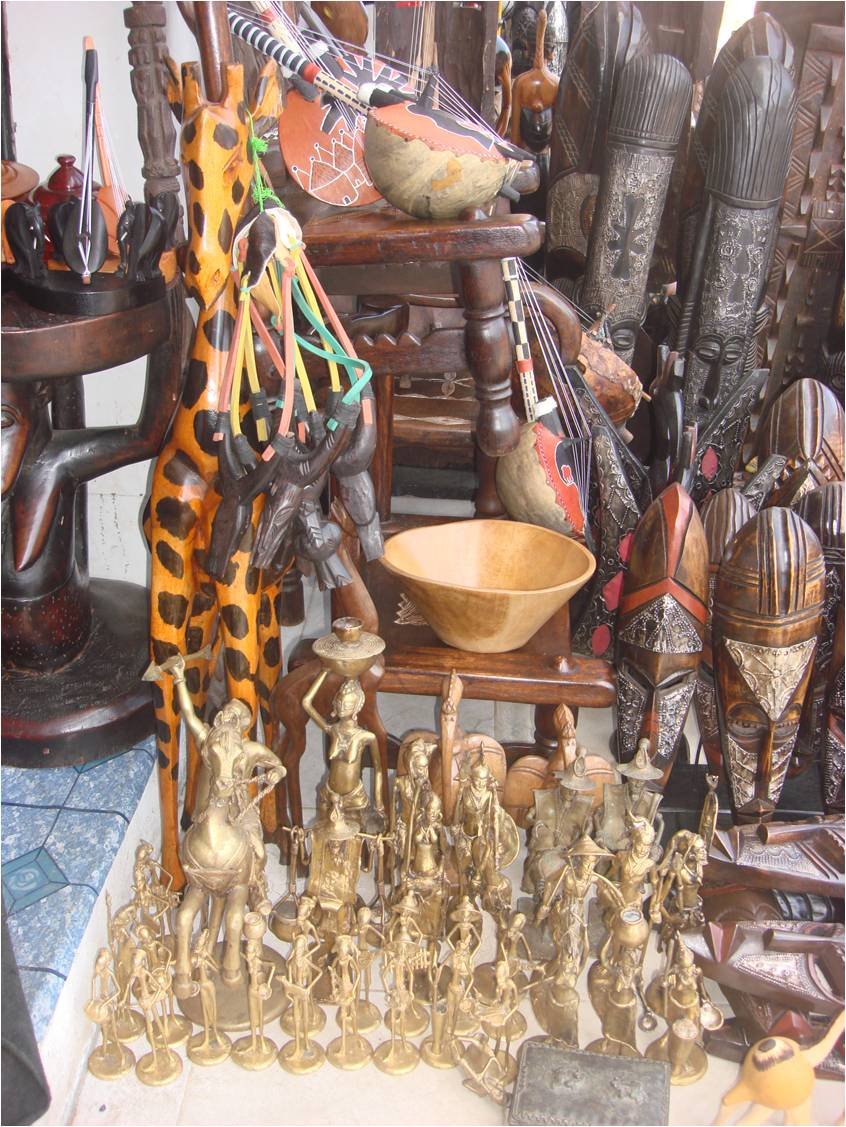 Statuettes en bronze et masques en bois vendus dans le commerce à Abidjan